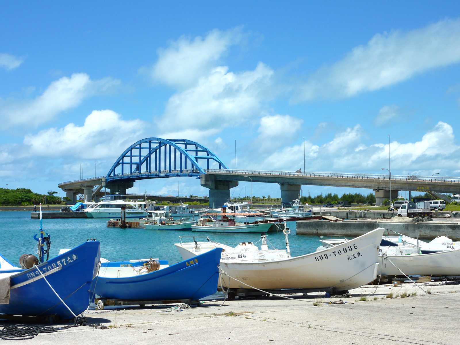 サザンゲートブリッジ（沖縄県石垣市）